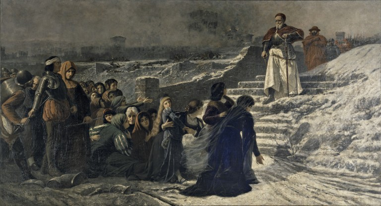 In alto la figura di papa Giulio II, seguito dai suoi soldati, cinto da una corazza ed appoggiato a uno spadone da battaglia. In basso la folla genuflessa. Tra la folla si possono notare le figure del Trivulzio, della fanciulla e della contessa di cui però non si vede il viso. Sullo sfondo si intravede il profilo di Mirandola sotto la neve. Il dipinto, di fine esecuzione, è stato acquistato dal Comune di Mirandola, dal geometra Giovanni Urbani di Valdagno.